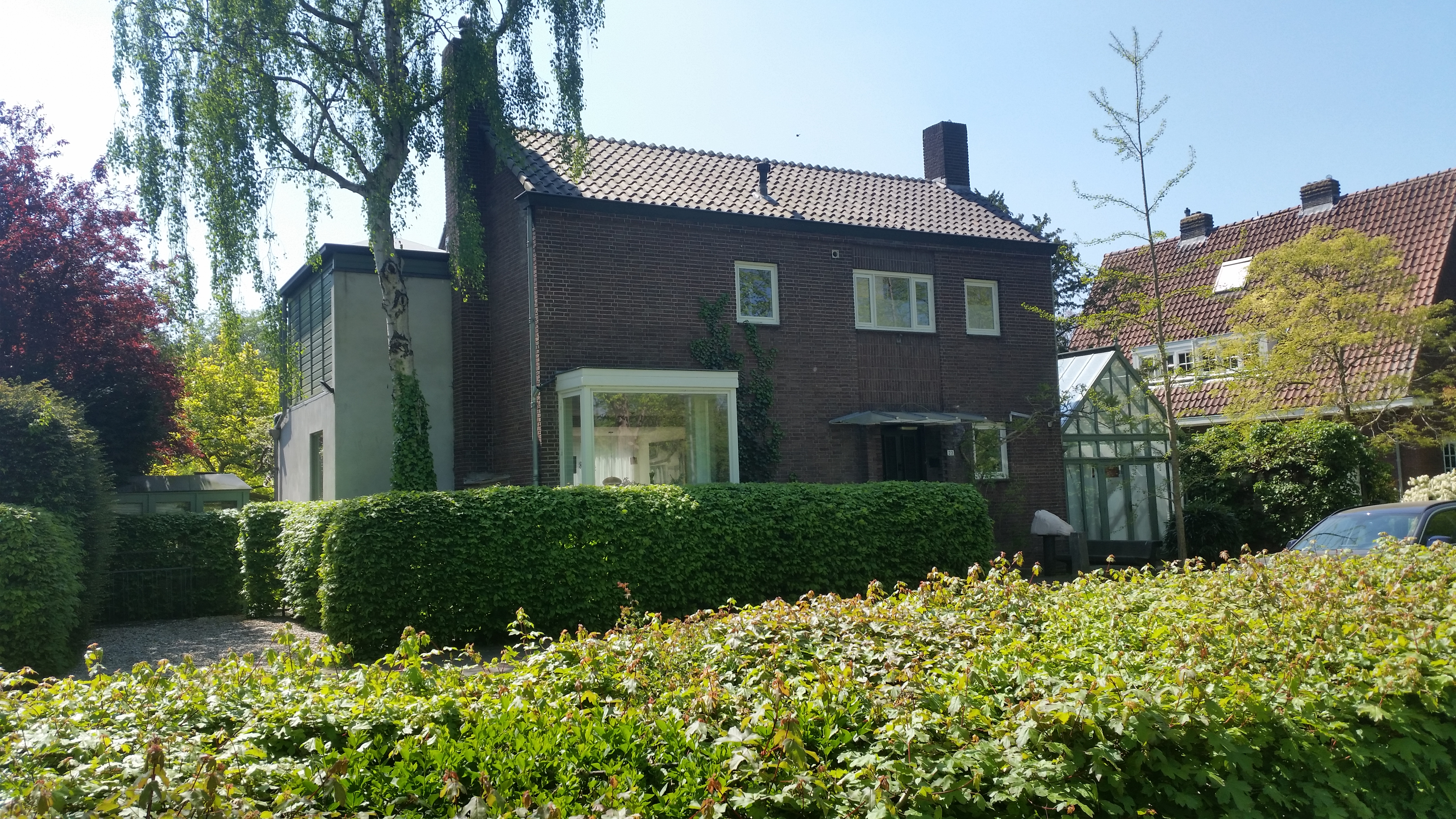 Impressie van de stadsvilla's aan de Zuidelijke Wanelweg, Amsterdam-Zuid (april 2020)